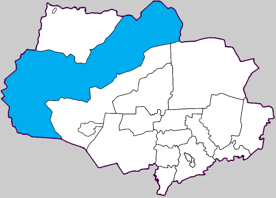 Каргасокский район Томской области